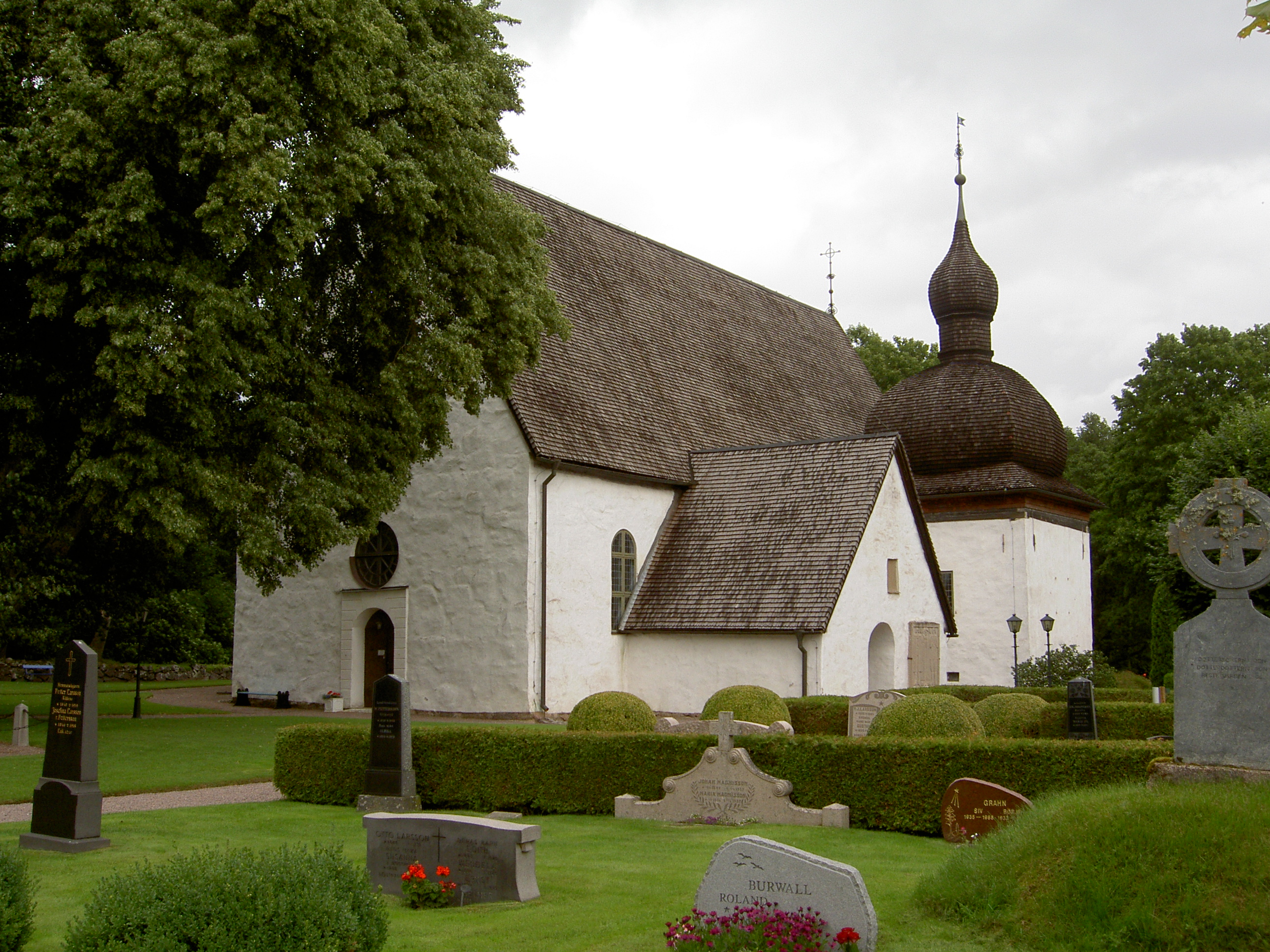 Norra Fågelås kyrka